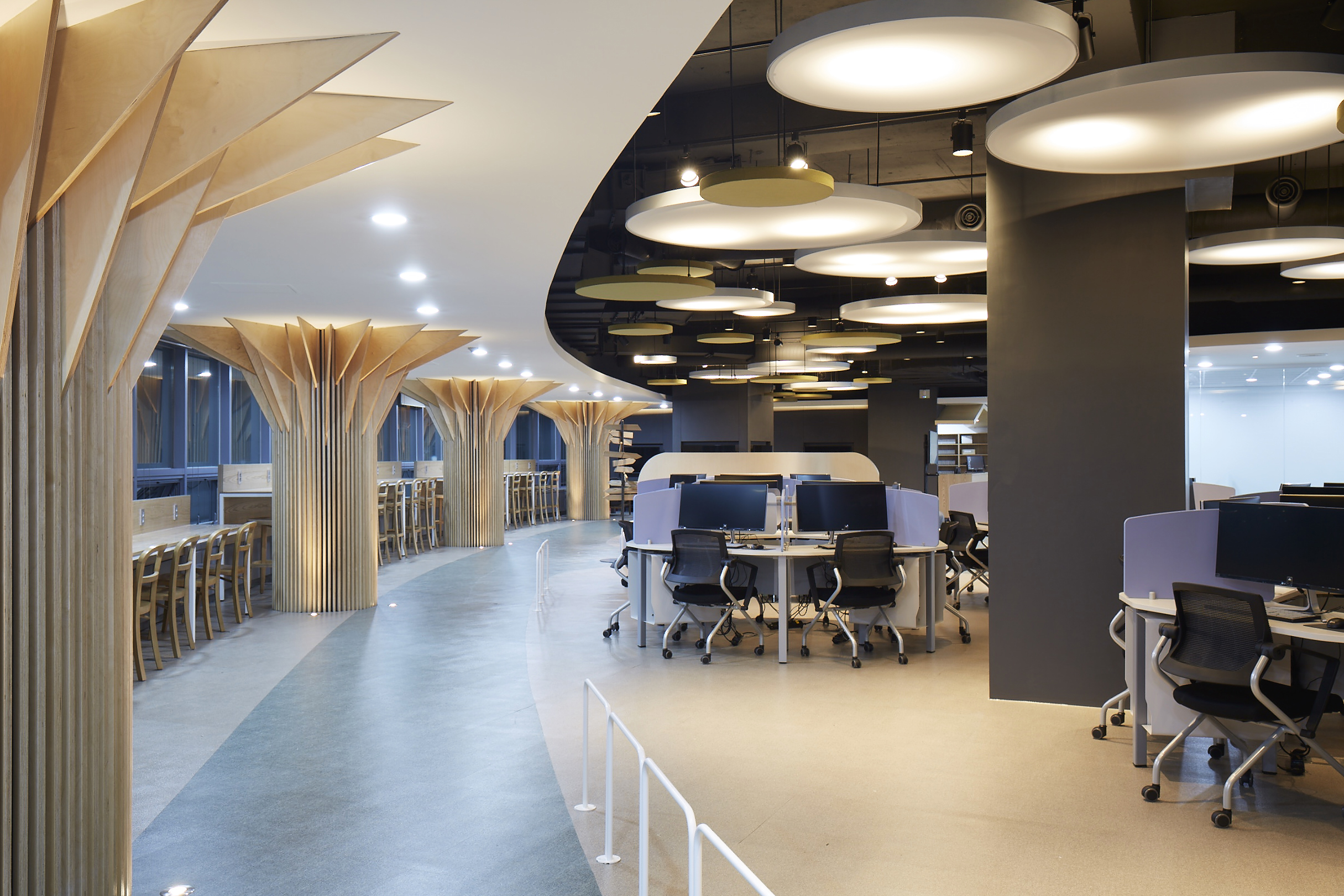 동국대 중앙도서관